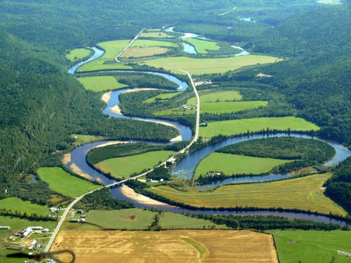 La rivière Croche ( on peut voir en bas le début du village La Croche )